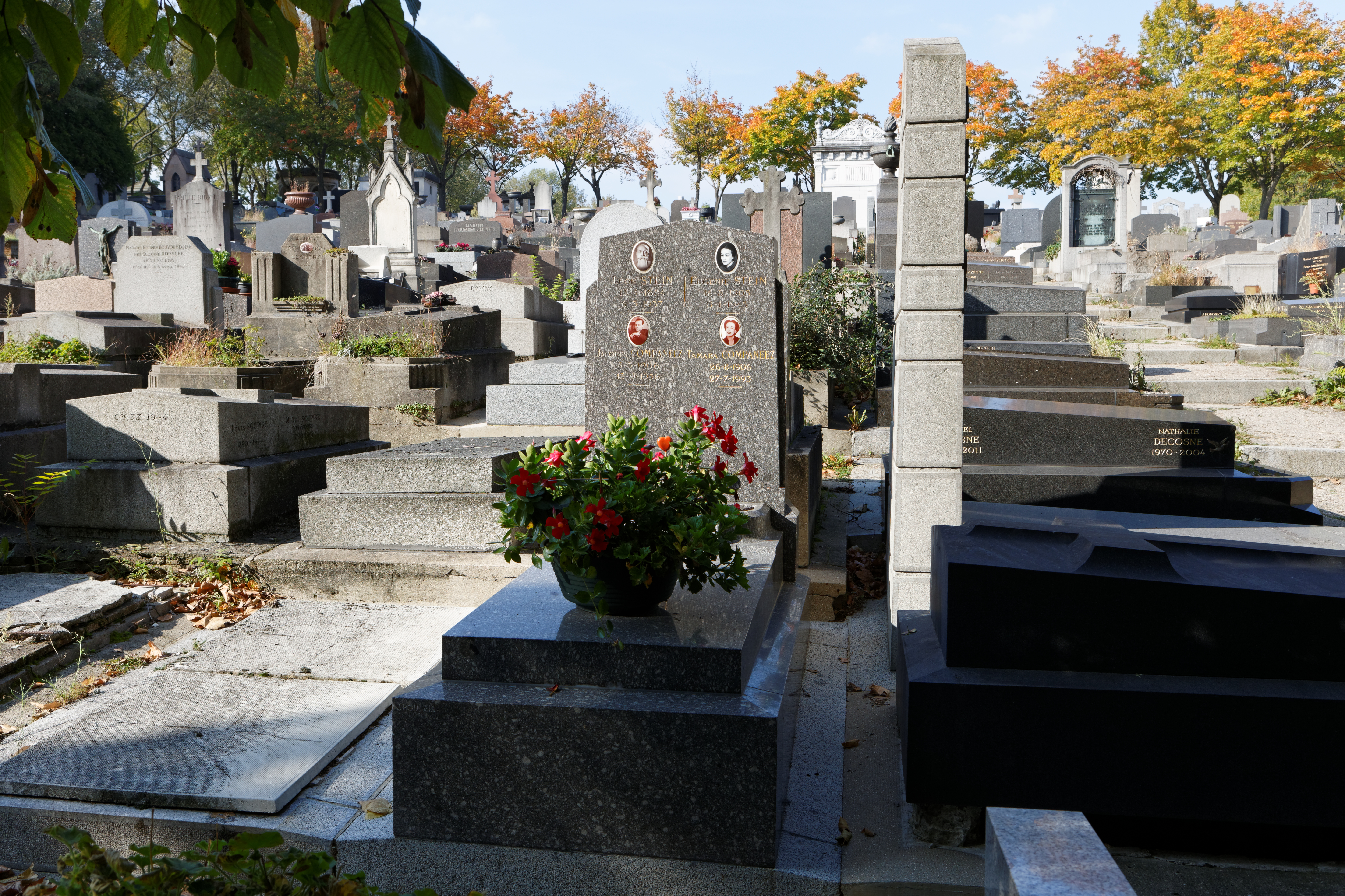 Sépulture de Nina Companeez, réalisatrice, scénariste et dramaturge.